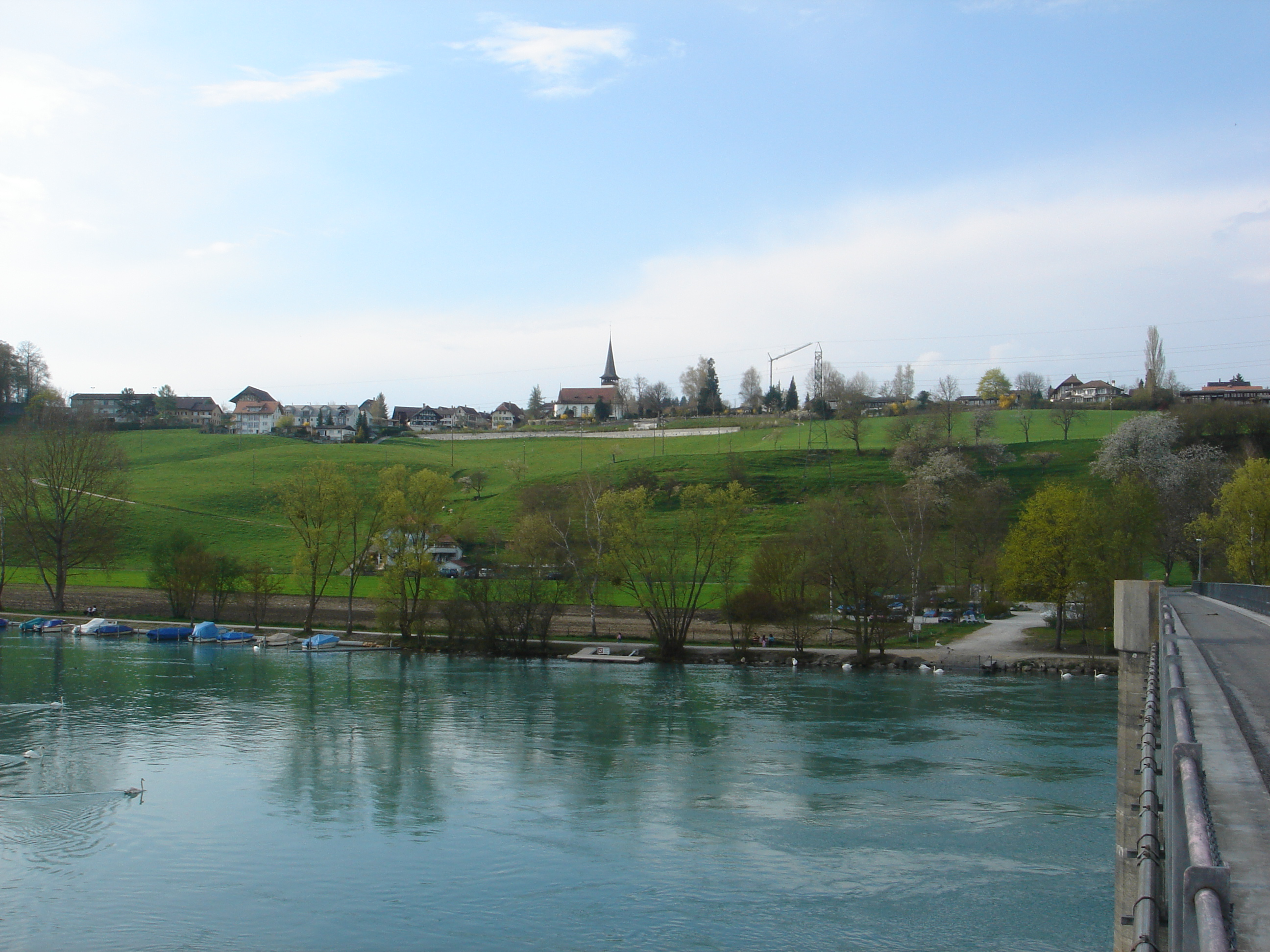 Südansicht von Wohlensee und Wohlen bei Bern